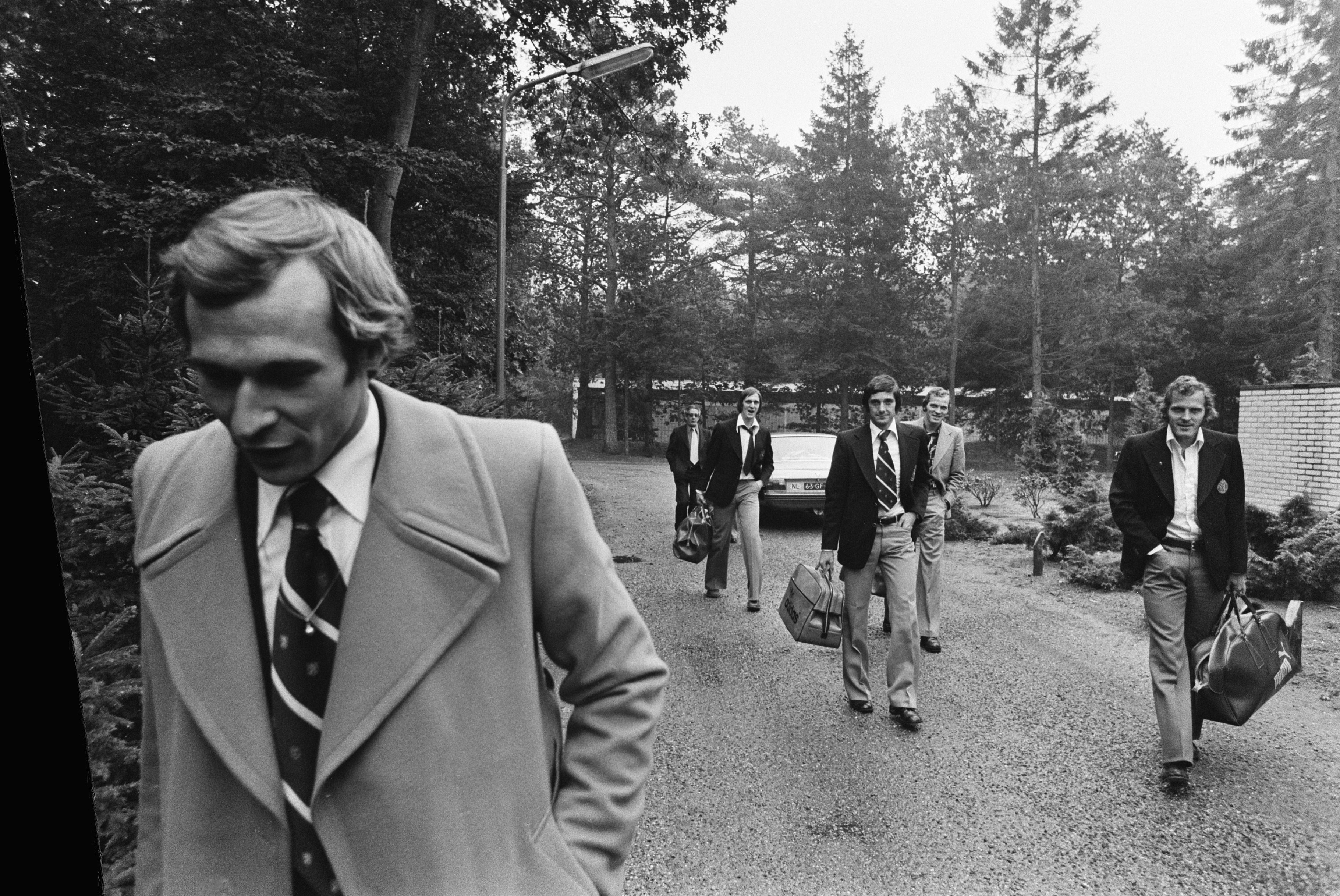 Vertrek PSV-spelers Van Beveren en Van der Kuylen; aankomst PSV-ers. Andere PSV-spelers: René en Willy van de Kerkhof en (waarsch.) Kees Krijgh jr.. Datum 13 oktober 1975